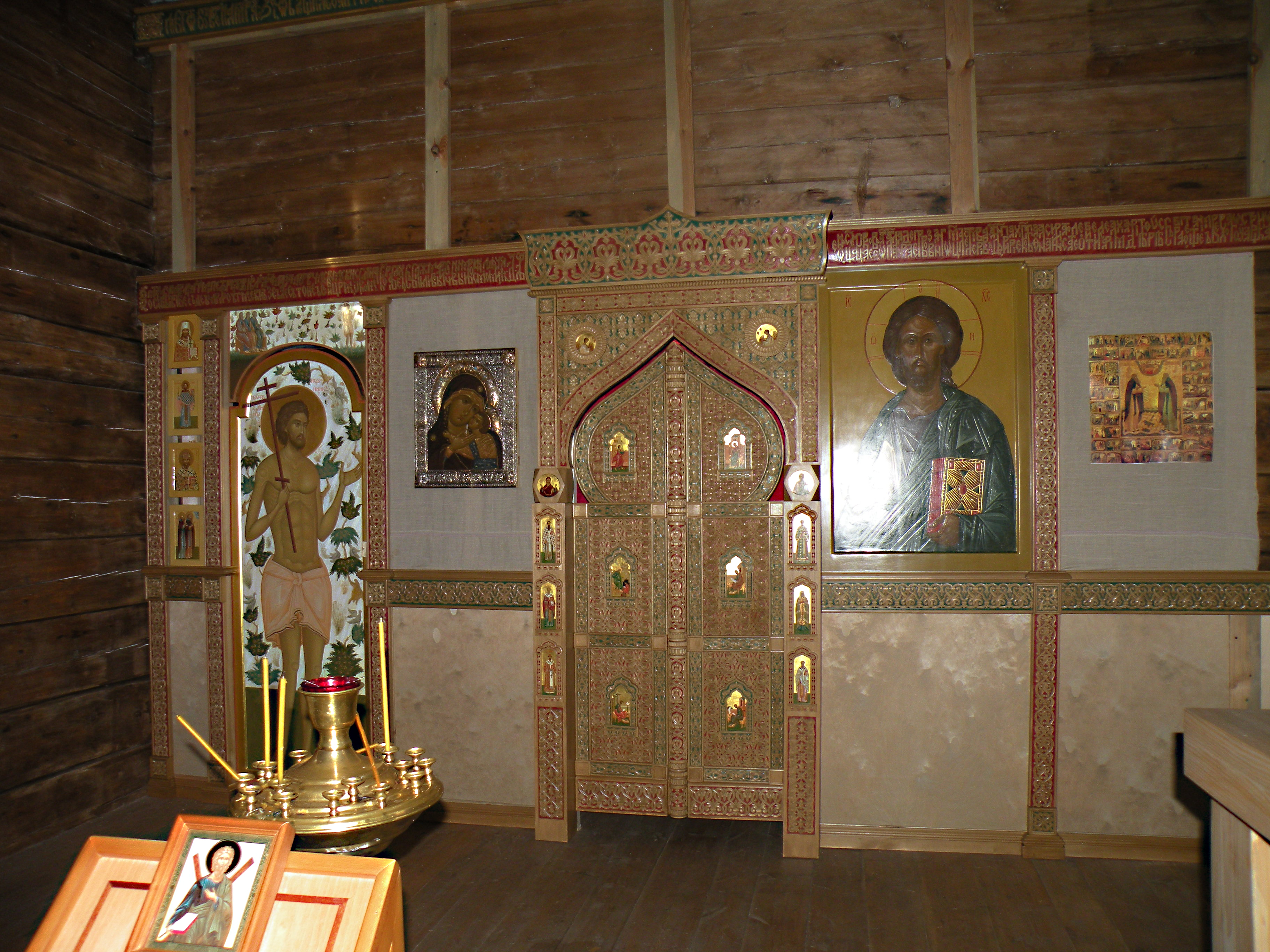 Алтарь часовни. Часовня стала религиозным центром организованной здесь Свято-Андреевской пустыни. В первые годы большевистского эксперимента здесь находился концлагерь для женщин.